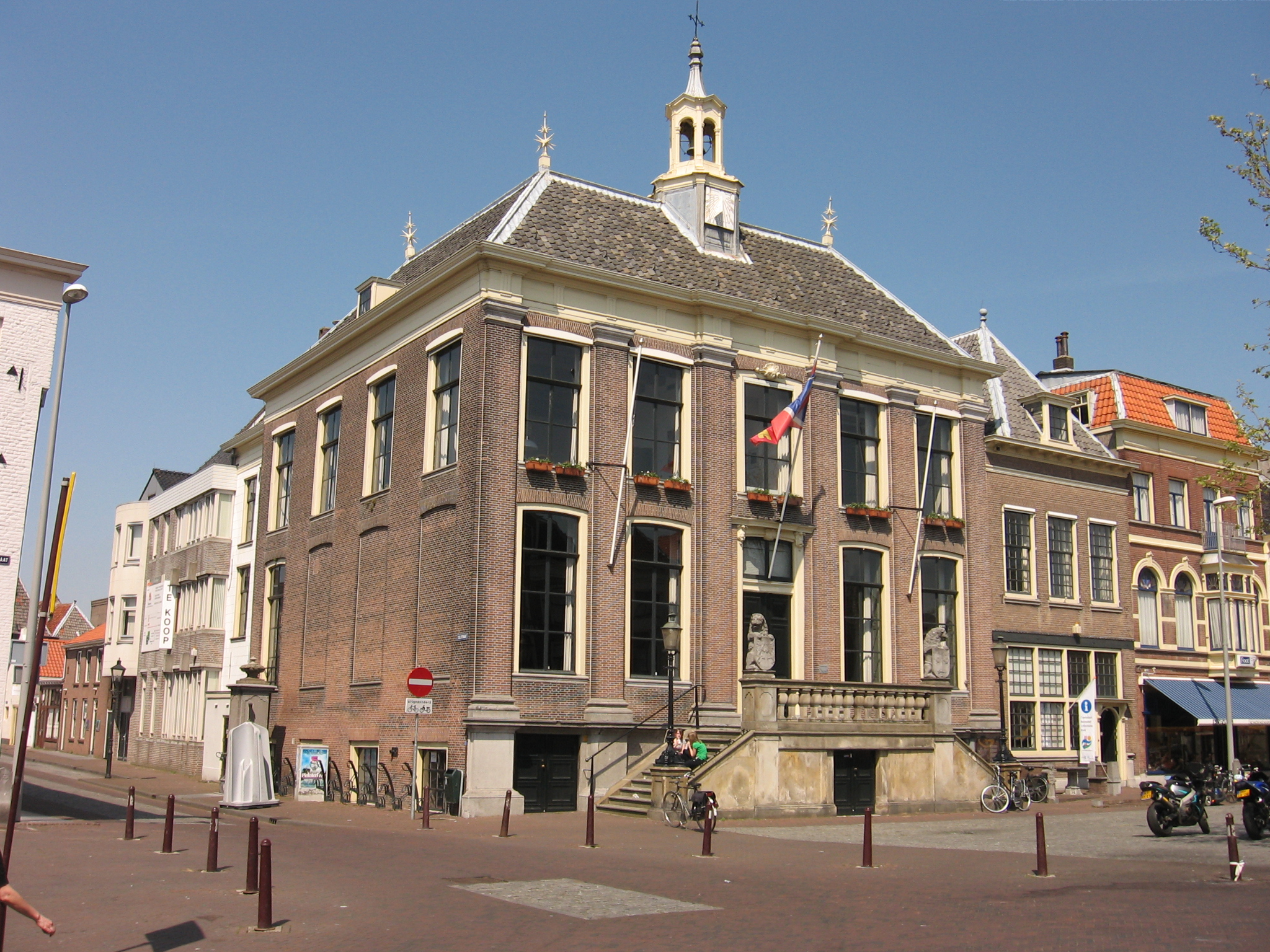 Zaltbommel